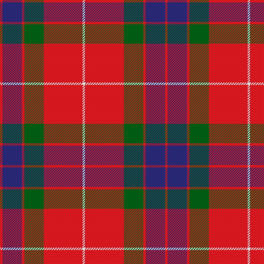 R/4 B32 R4 G32 R64 W/4